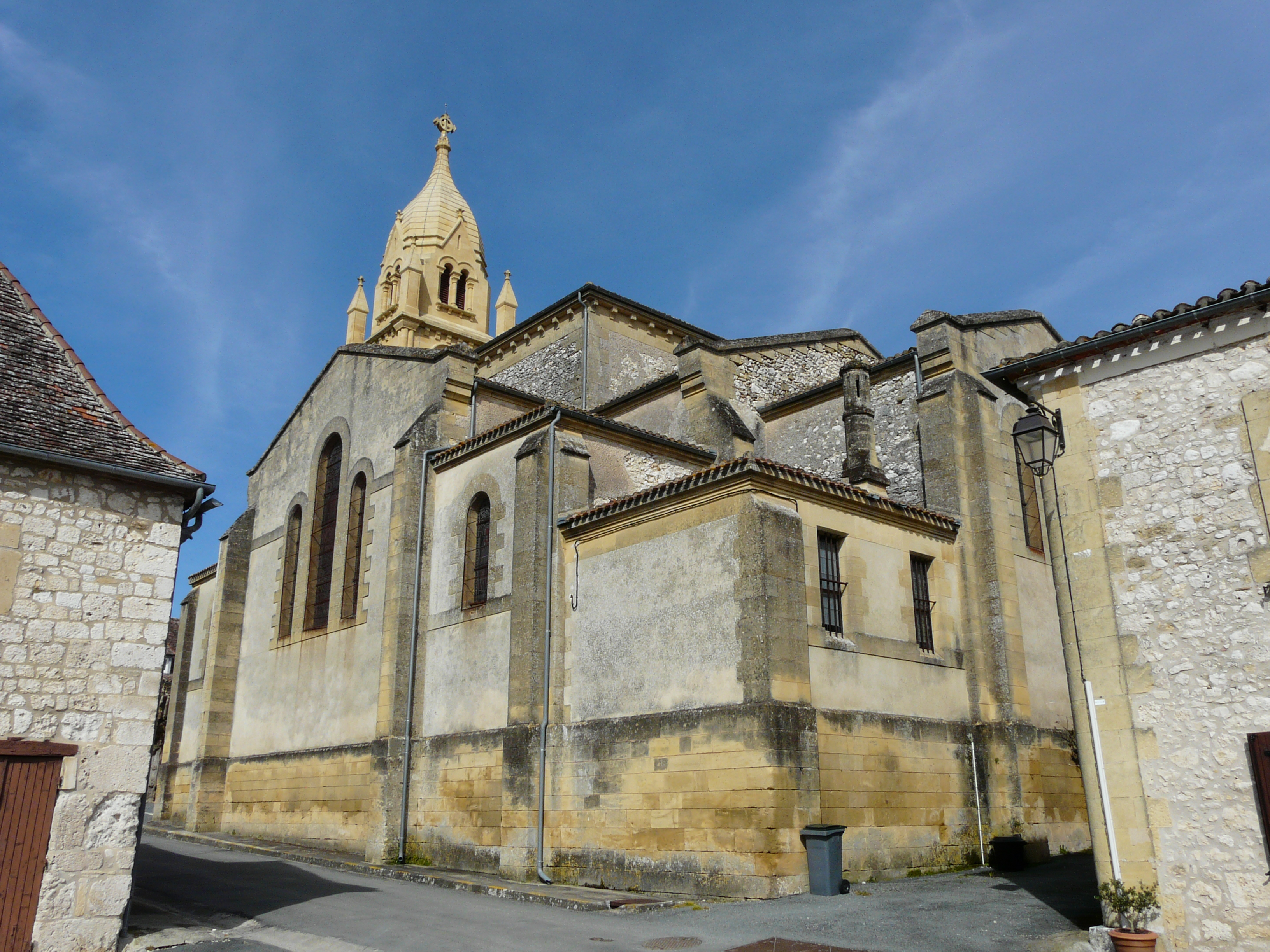 L'église Saint-Saturnin, Faux, Dordogne, France.